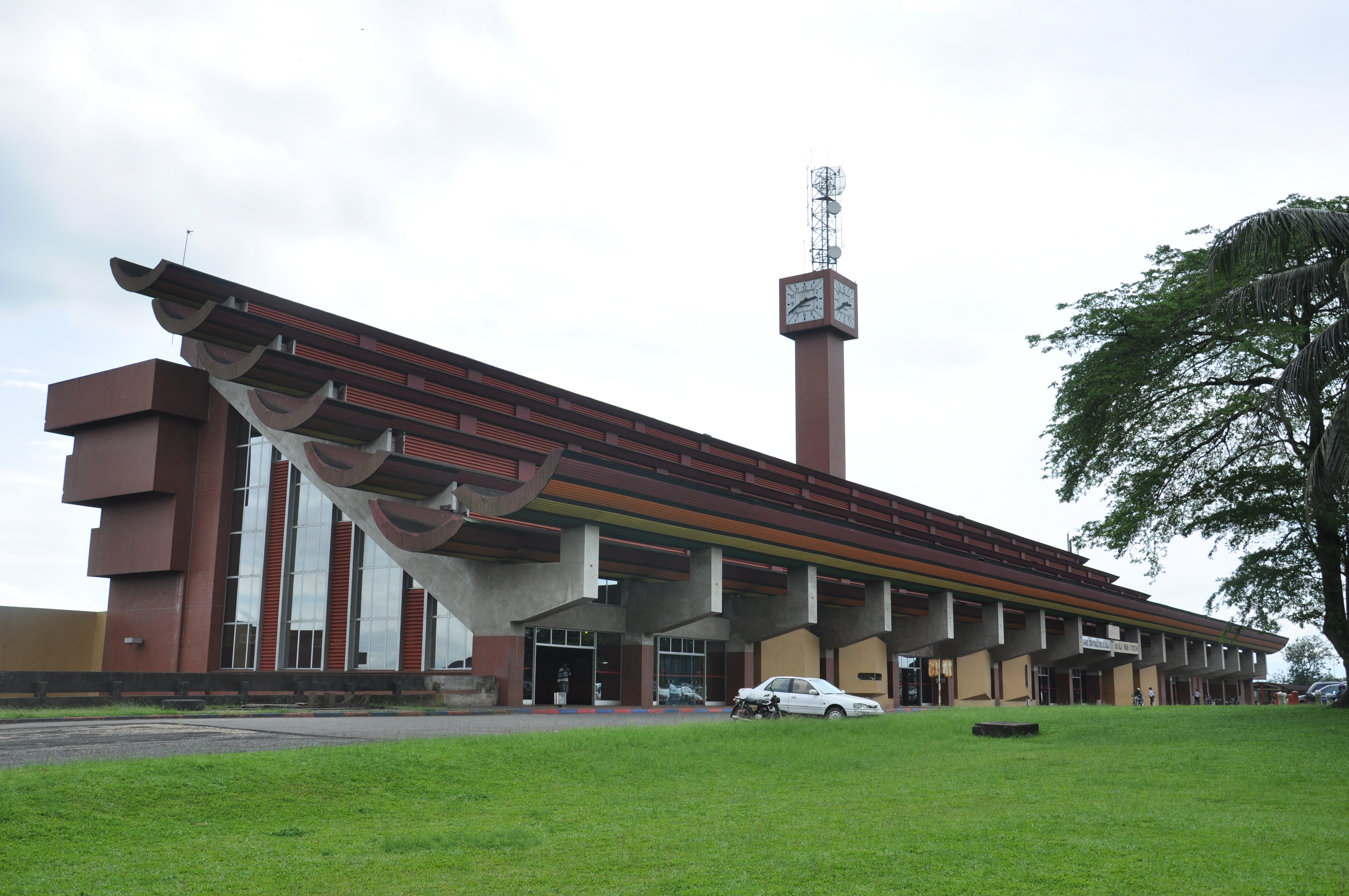 Gare de Bessengué